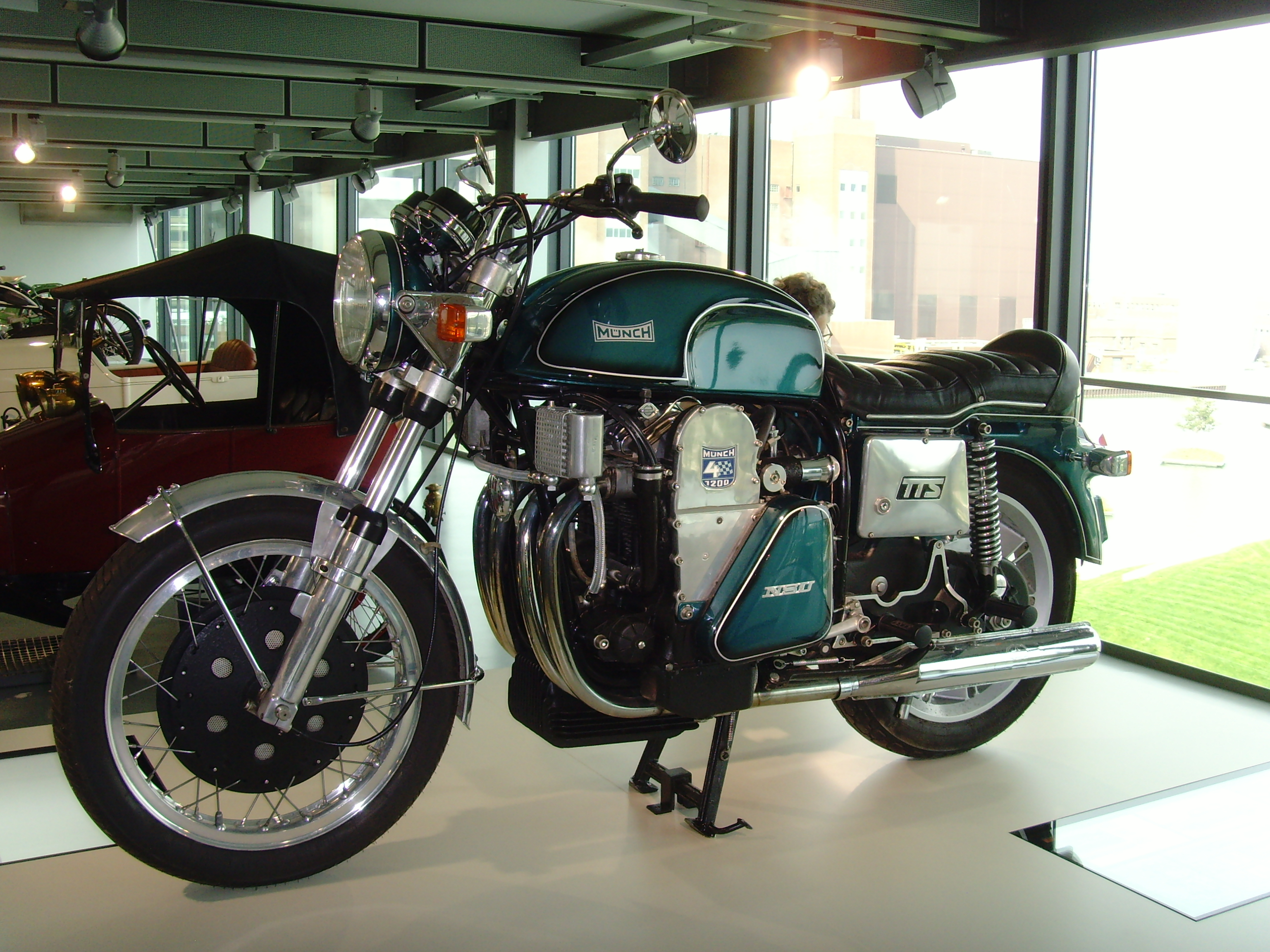 Autostadt Wolfsburg - motorrad ikonen - Münch TTS 1